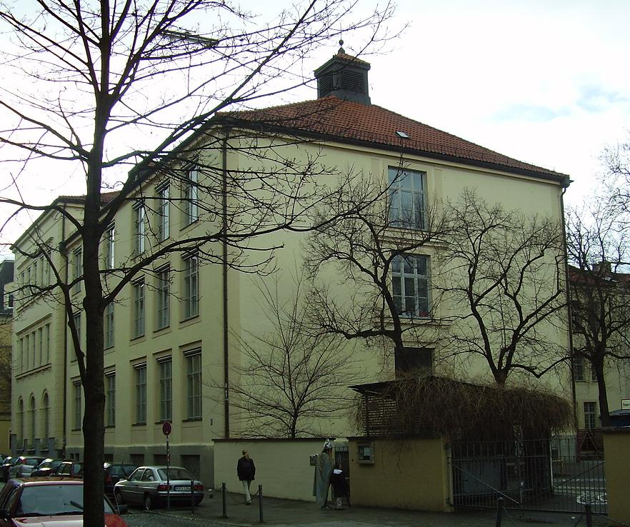 Klenzeschule in München, Ecke Ickstattstraße/Klenzestraße, in die schon Karl Valentin gegangen ist.